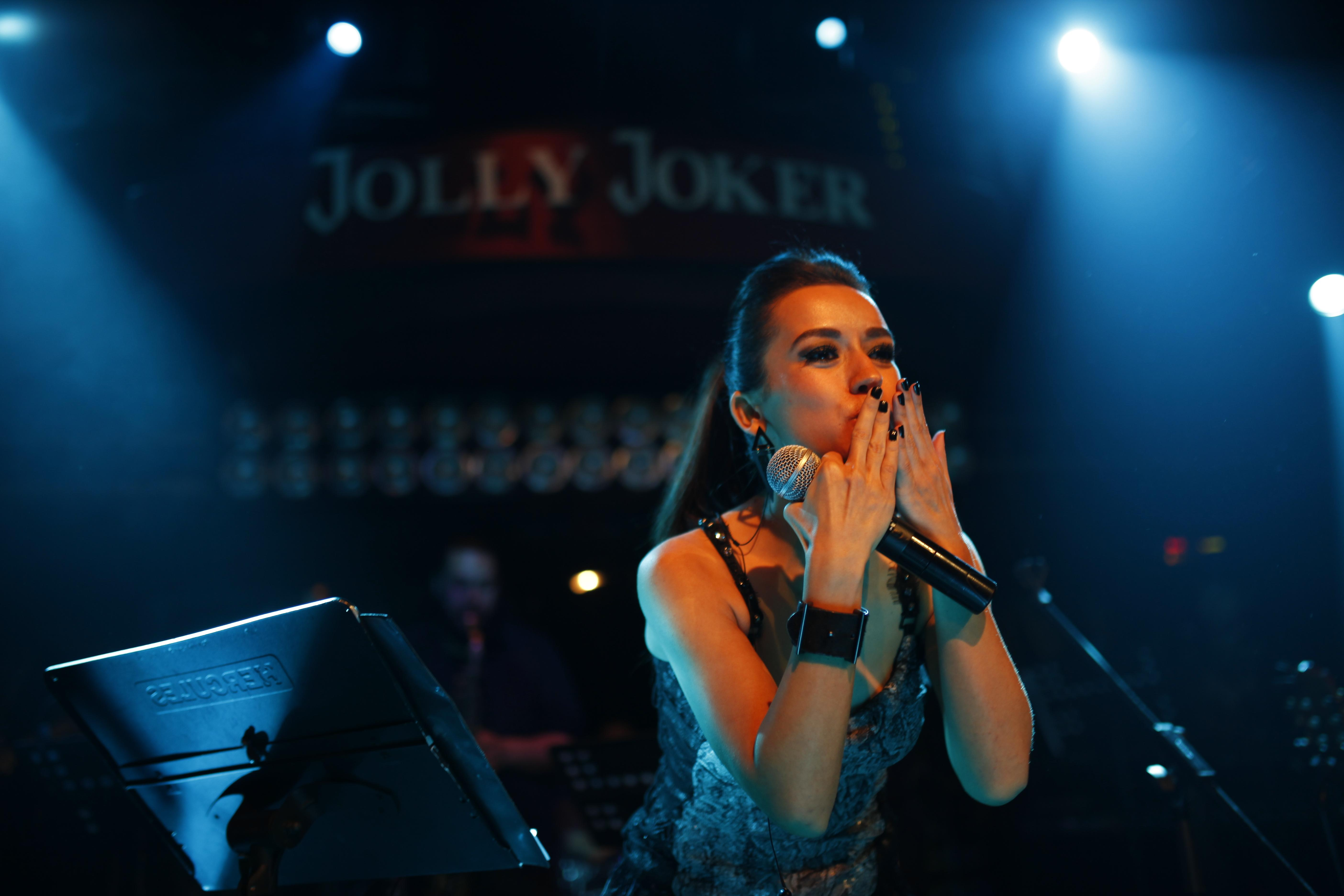 Tuğba Yurt, İstanbul Jolly Joker sahnesinde.